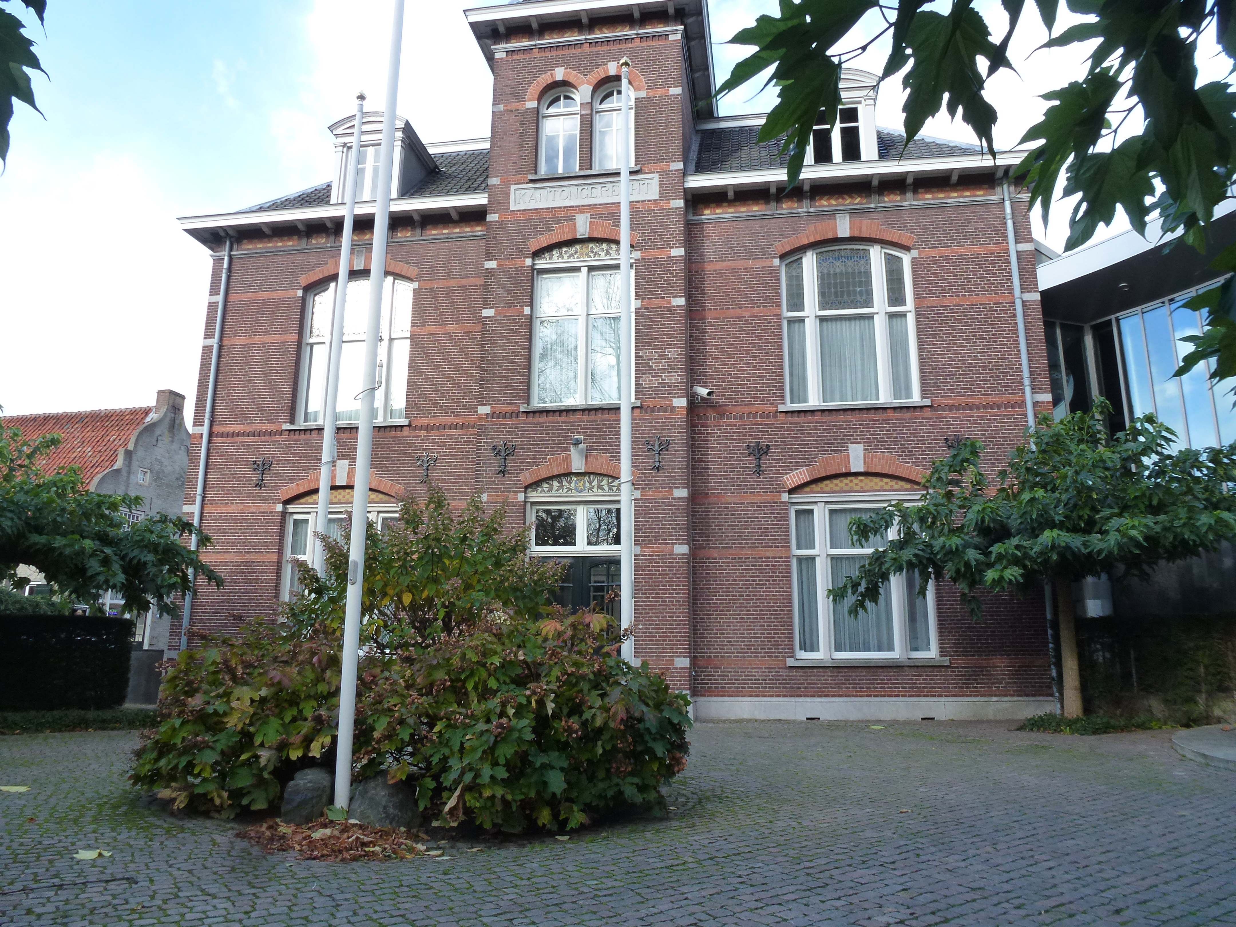 Kerkstraat 7 Oirschot